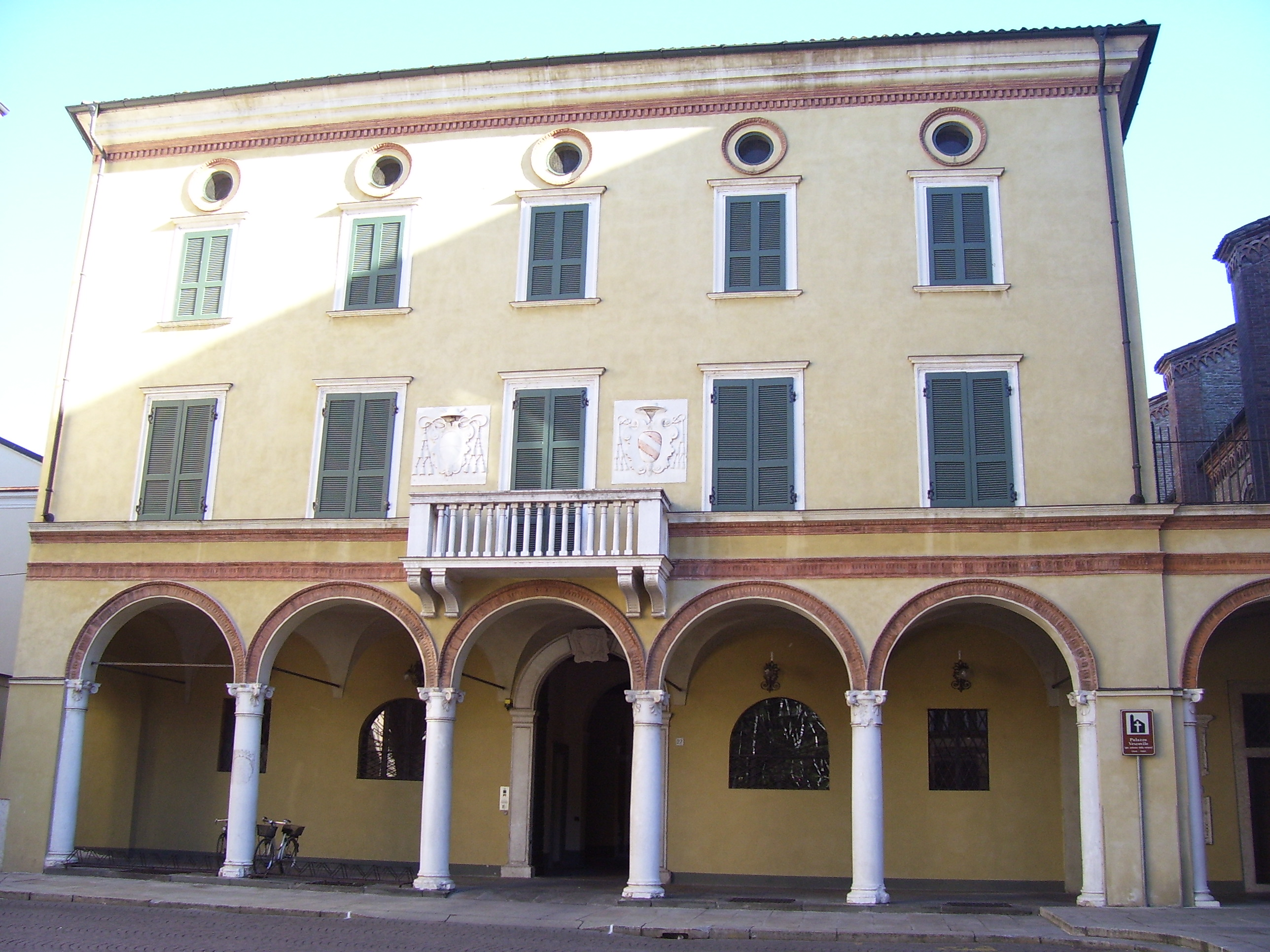 Palazzo Vescovile della città di Crema (CR)